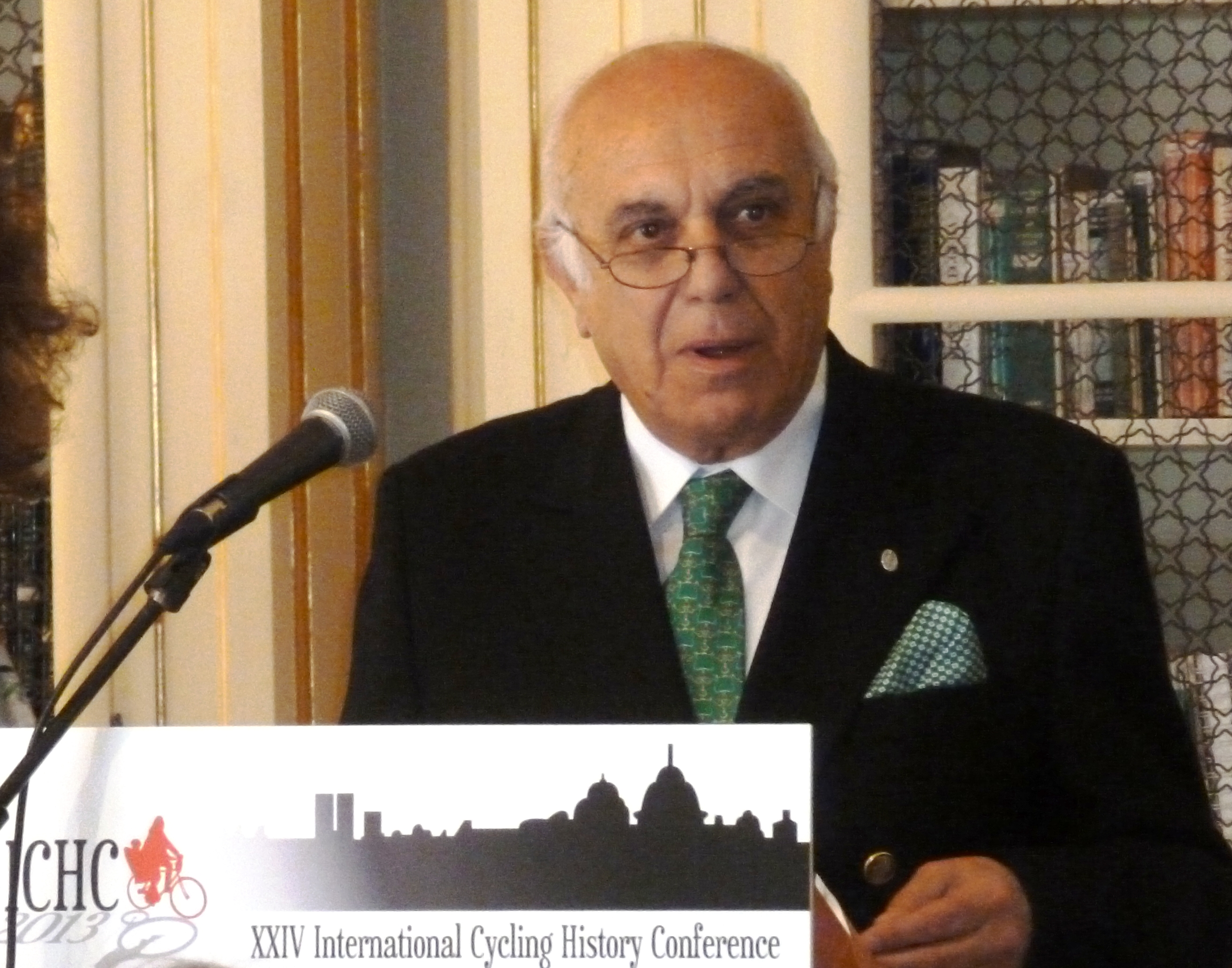 Artur M. Lopes, President of the Portuguese Cycling Federation